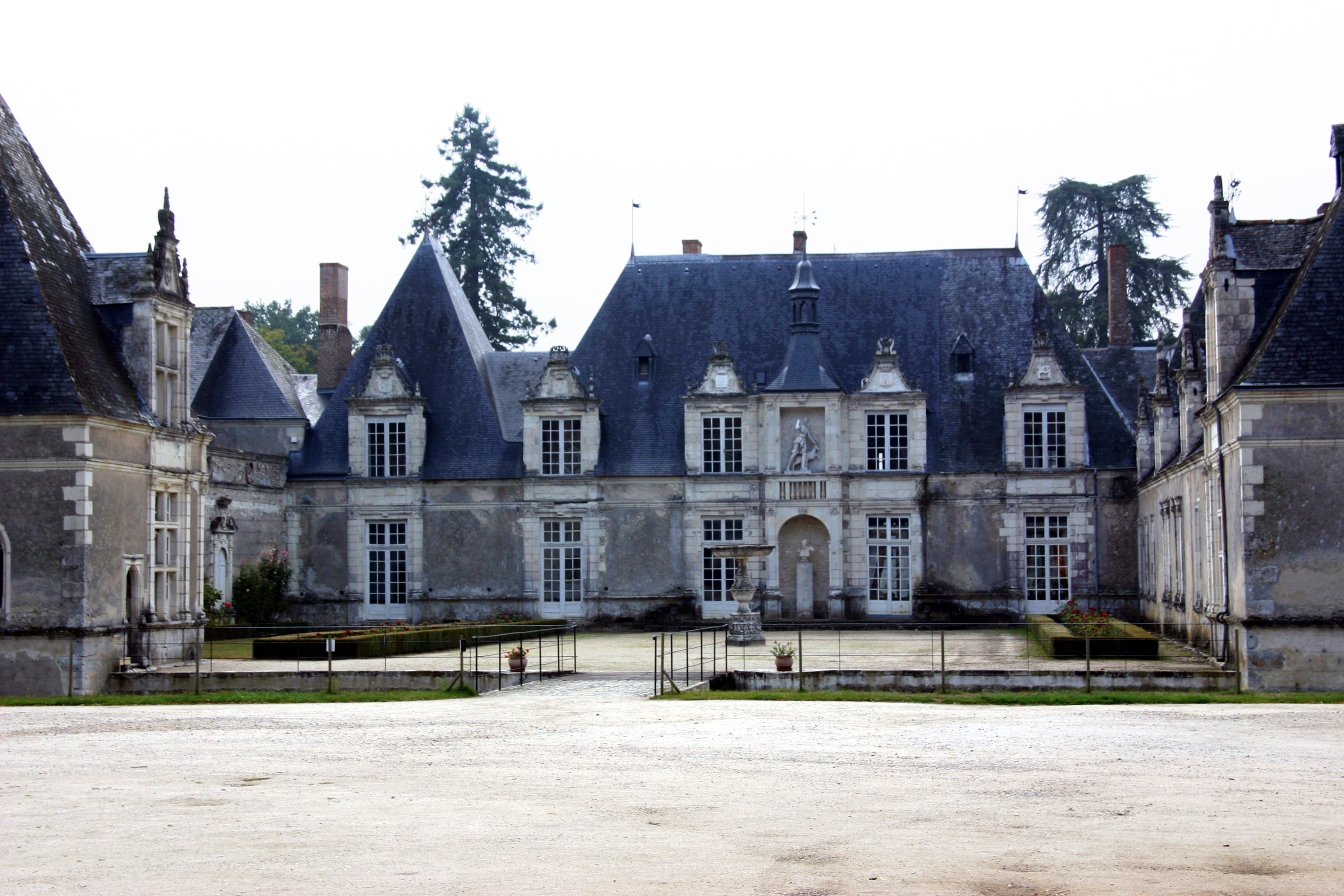 Château de Villesavin